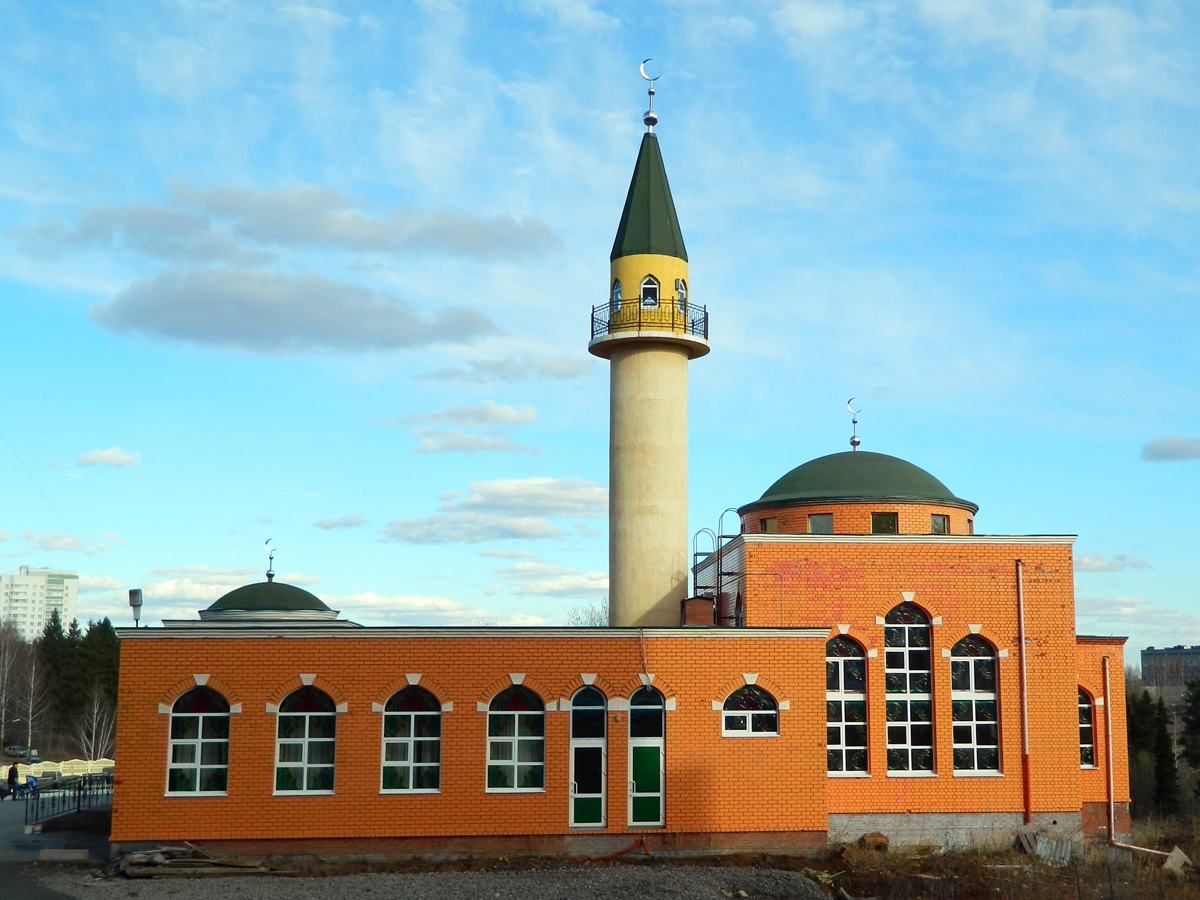 Мечеть Иман Нуры (Ижевск)